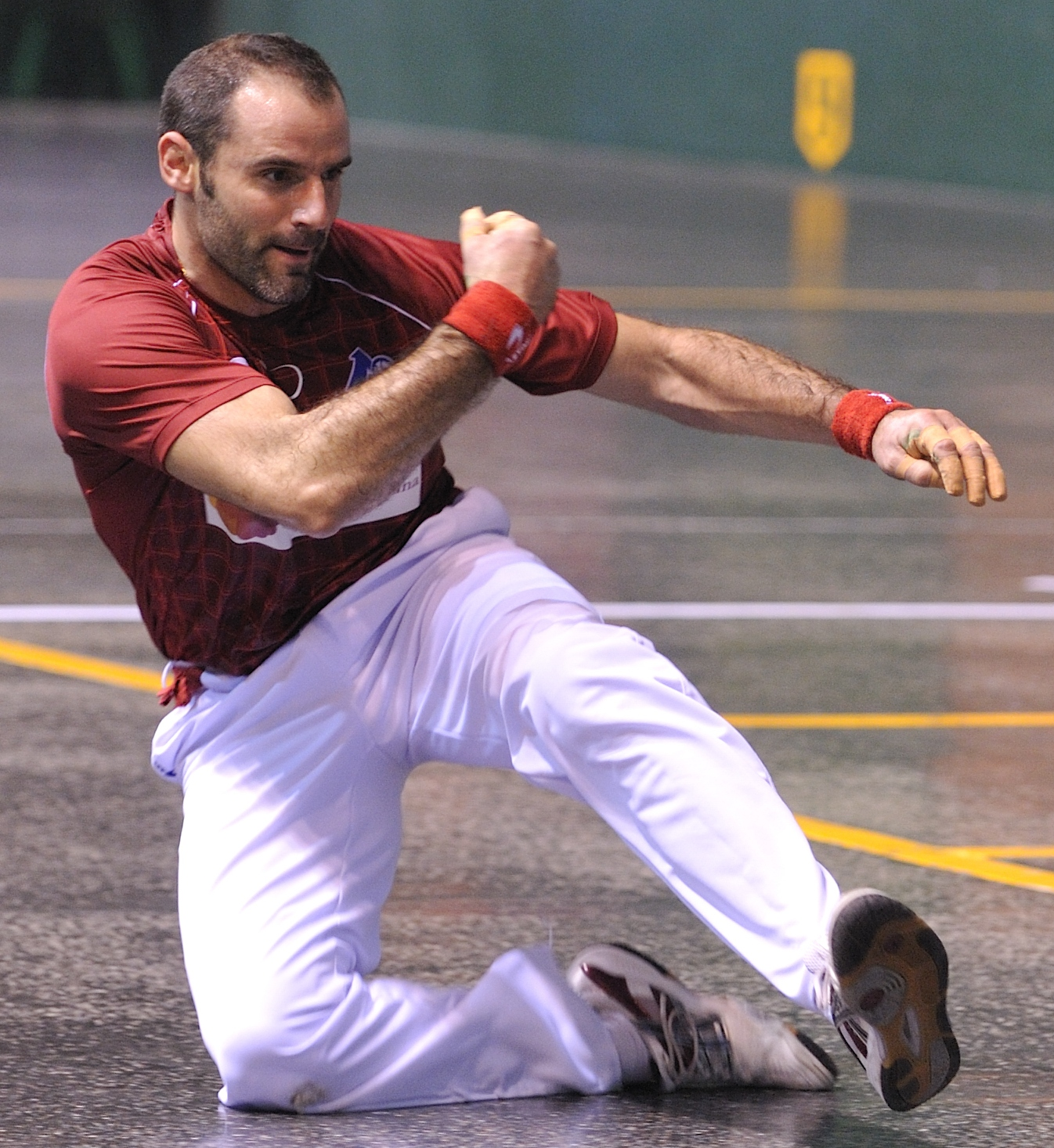 Xala Donostiako Atano III.a pilotalekuan, euskararen aldeko pilota jaialdi batean